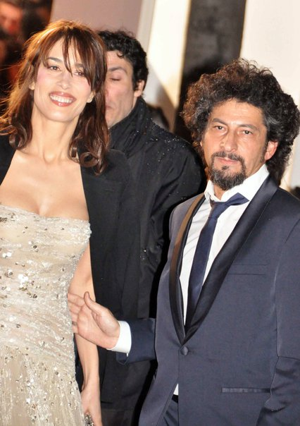 Dolorès Chaplin et Radu Mihaileanu à la cérémonie des Césars 2010.